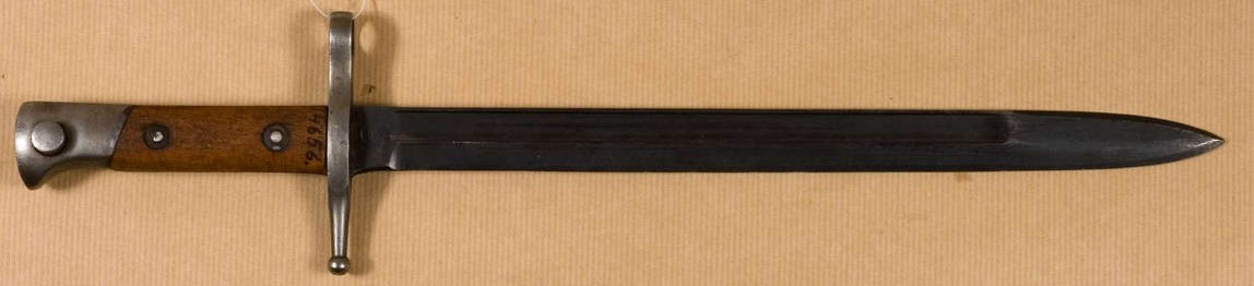 Bajonet italijanske puške Carcano M1891.